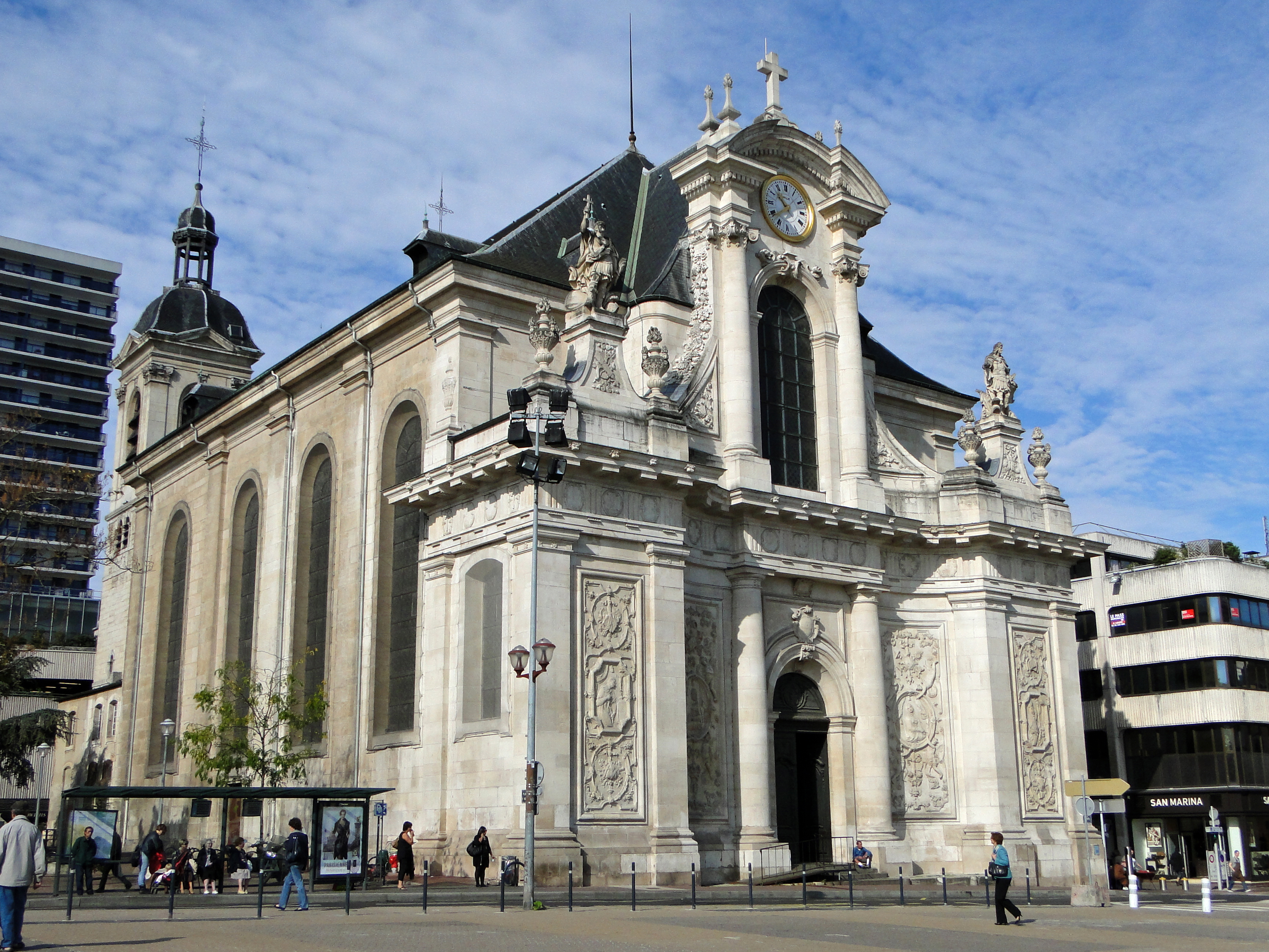 La paroisse Saint Sébastien a été créée le 21 novembre 1593 suite à la construction de la Ville Neuve de Nancy, par décision du Duc de Lorraine, Charles III. Une chapelle "provisoire" est construite en trois mois pendant l’année 1603 par le premier curé Jean Maréchaudel. Elle durera cependant plus d’un siècle. En 1682, une première tour est édifiée (celle de gauche en regardant la façade). La chapelle provisoire, devenue délabrée et dangereuse, est finalement démolie en 1719. Le 20 juillet 1720, sous le règne du duc Léopold, la première pierre de l’église actuelle est posée. La toiture fut posée en 1725 et l’ensemble terminé en 1731. La face principale de l'église a été récemment restaurée. Caractéristiques Ville : Nancy (54000) Quartier : Charles III - Centre ville Adresse: 76, rue des Ponts Livraison : 1731 Fonction : Édifice religieux Architecte : Jean-Nicolas Jennesson Données techniques Hauteur : 45.00 m